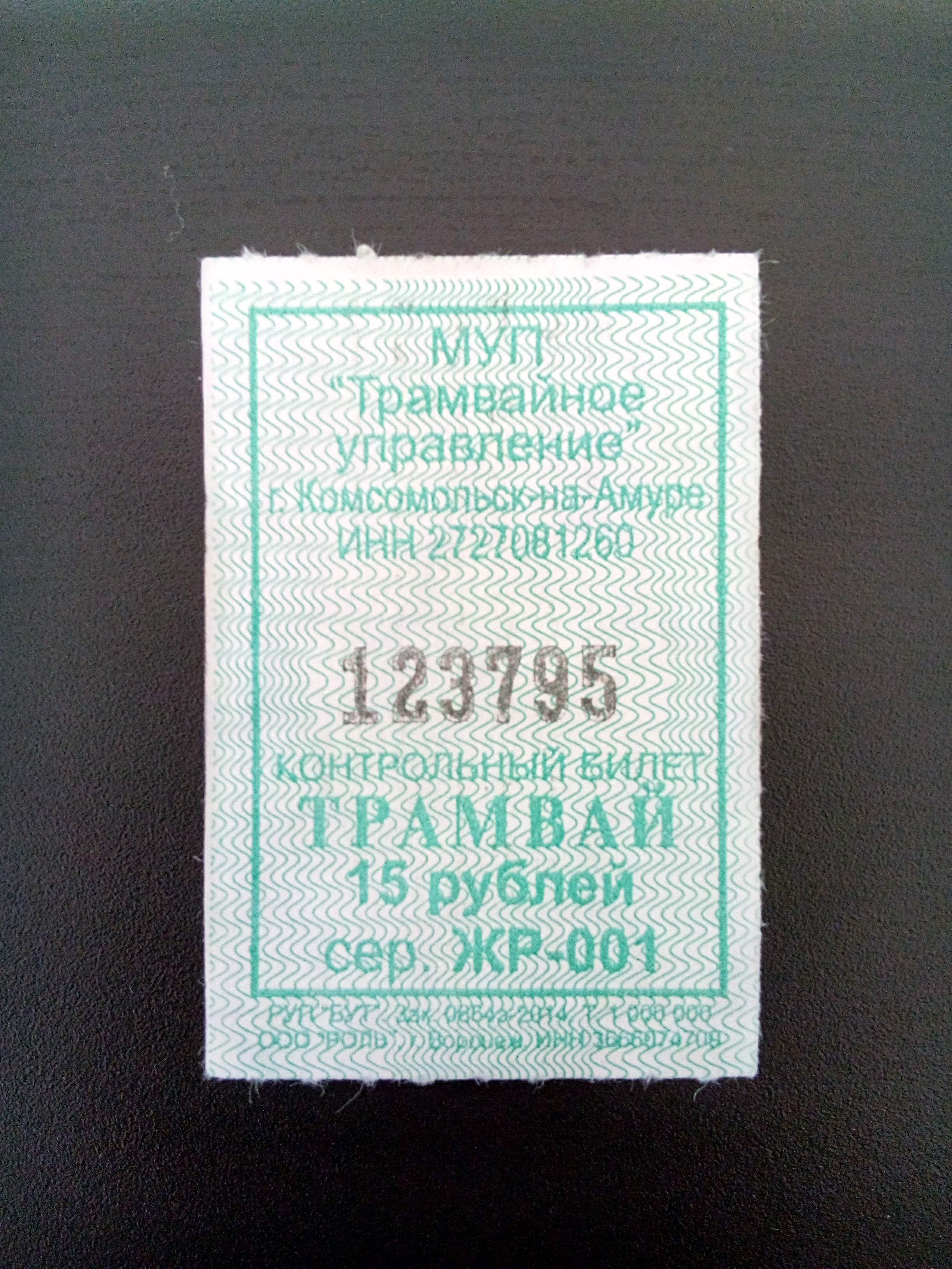 Билет на трамвай в Комсомольске-на-Амуре